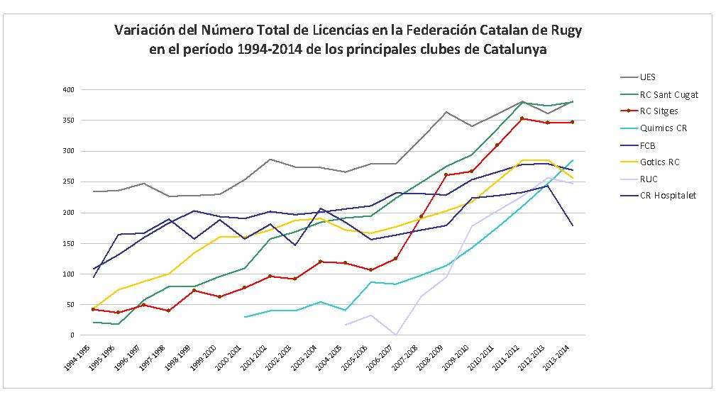 Licencias totales por club en la Federación Catalana de Rugby entre 1994 y 2004